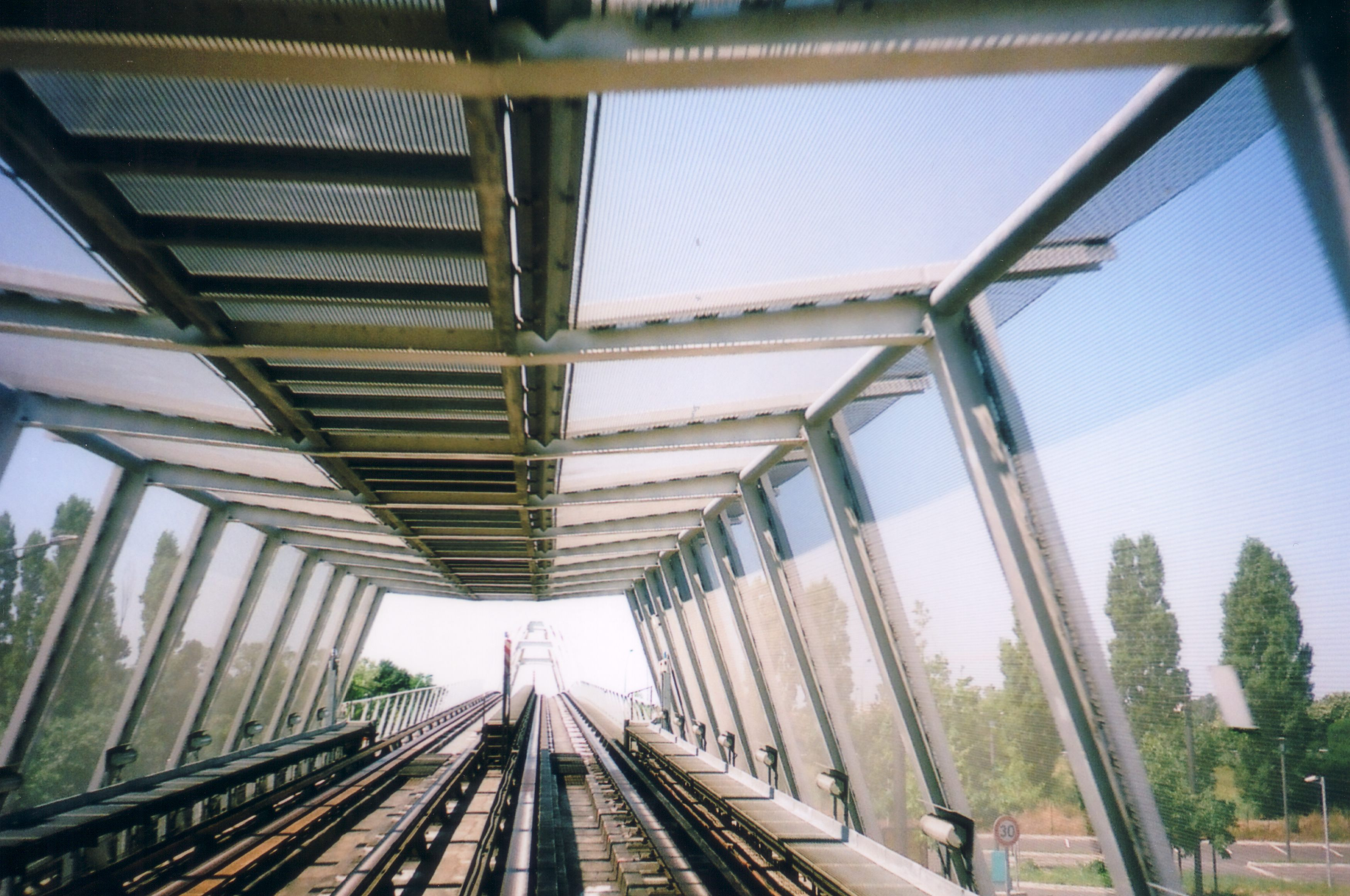 En sortant de la station Balma-Gramont, direction arrêt de métro Argoulet, Toulouse, France